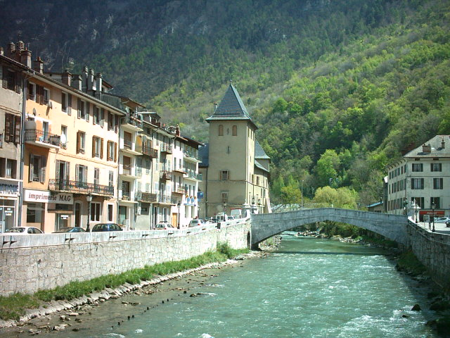 L'Isère à Moûtiers (Savoie, France).